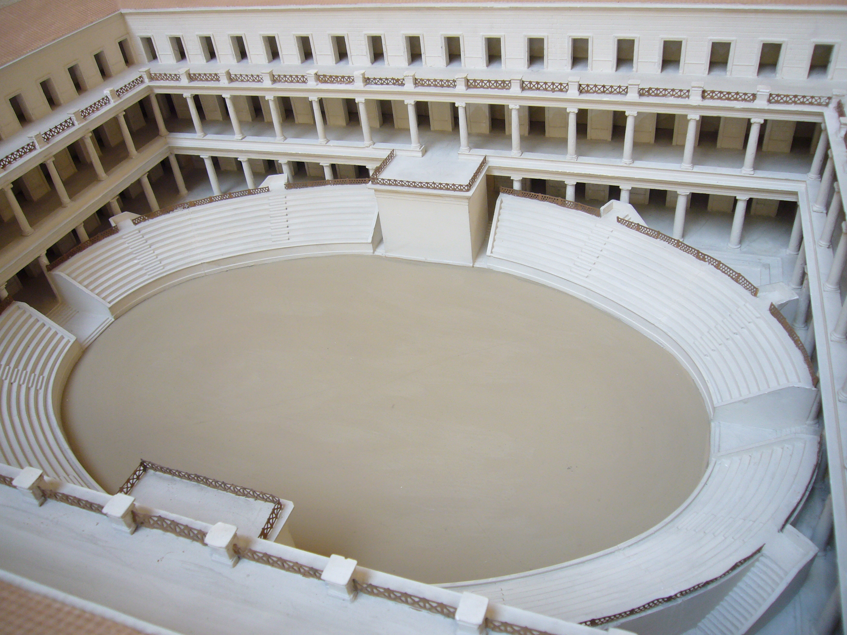 Roma, Museo della Civiltà romana: plastico del Ludus Magnus